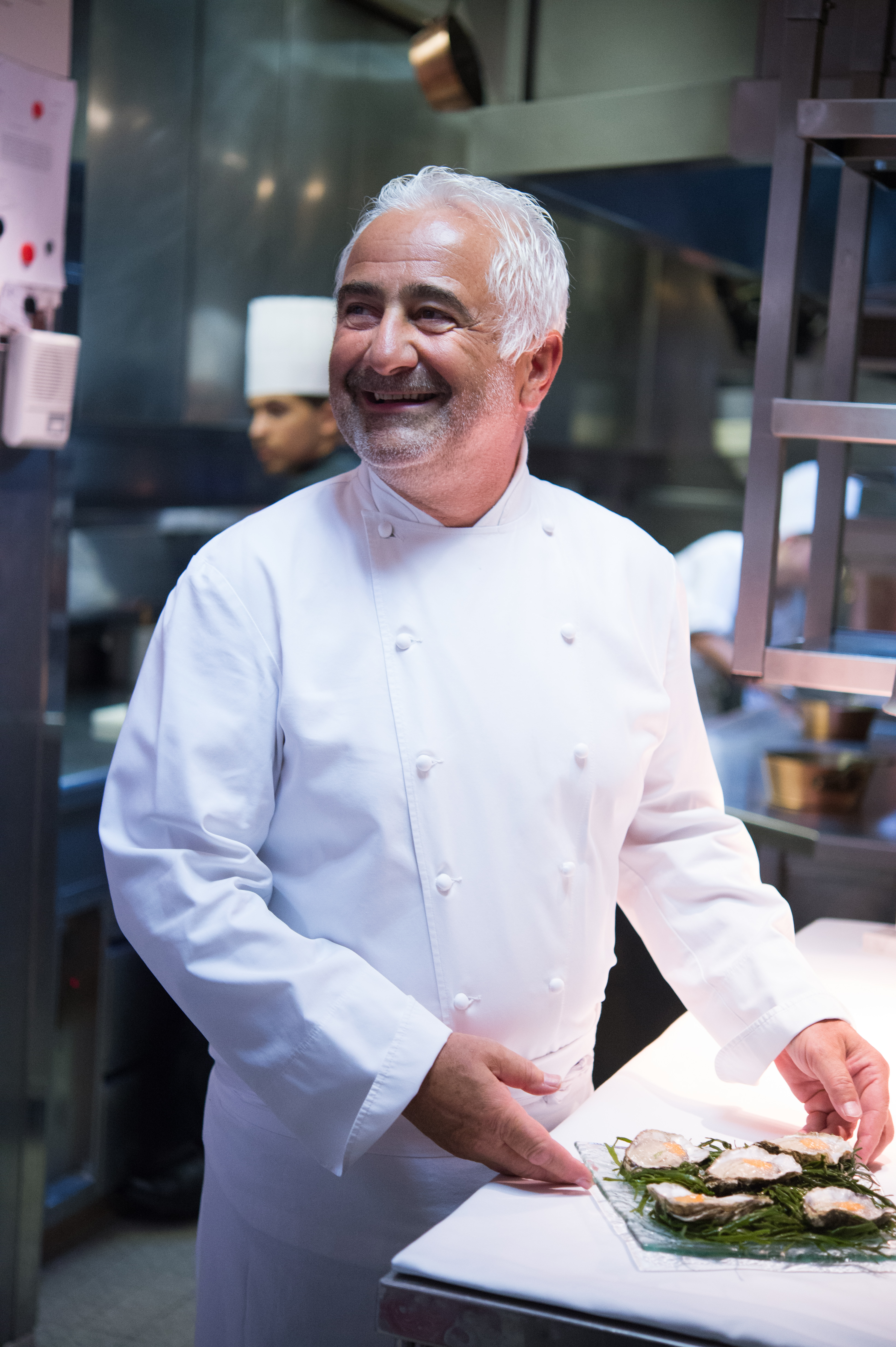 Guy Savoy le 7 août 2013